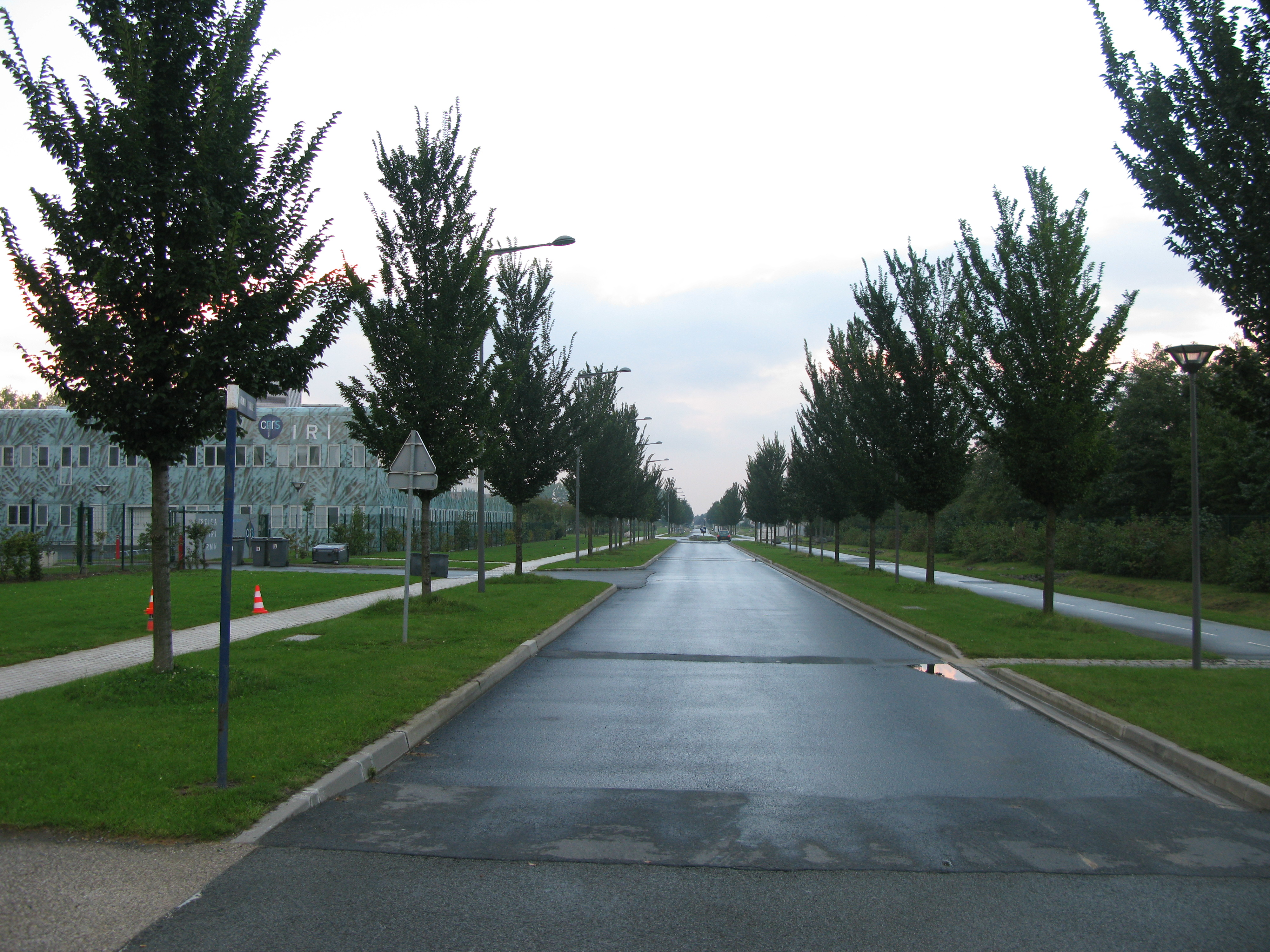 Avenue Halley et bâtiments du CNRS à la Haute Borne, à Villeneuve d'Ascq.